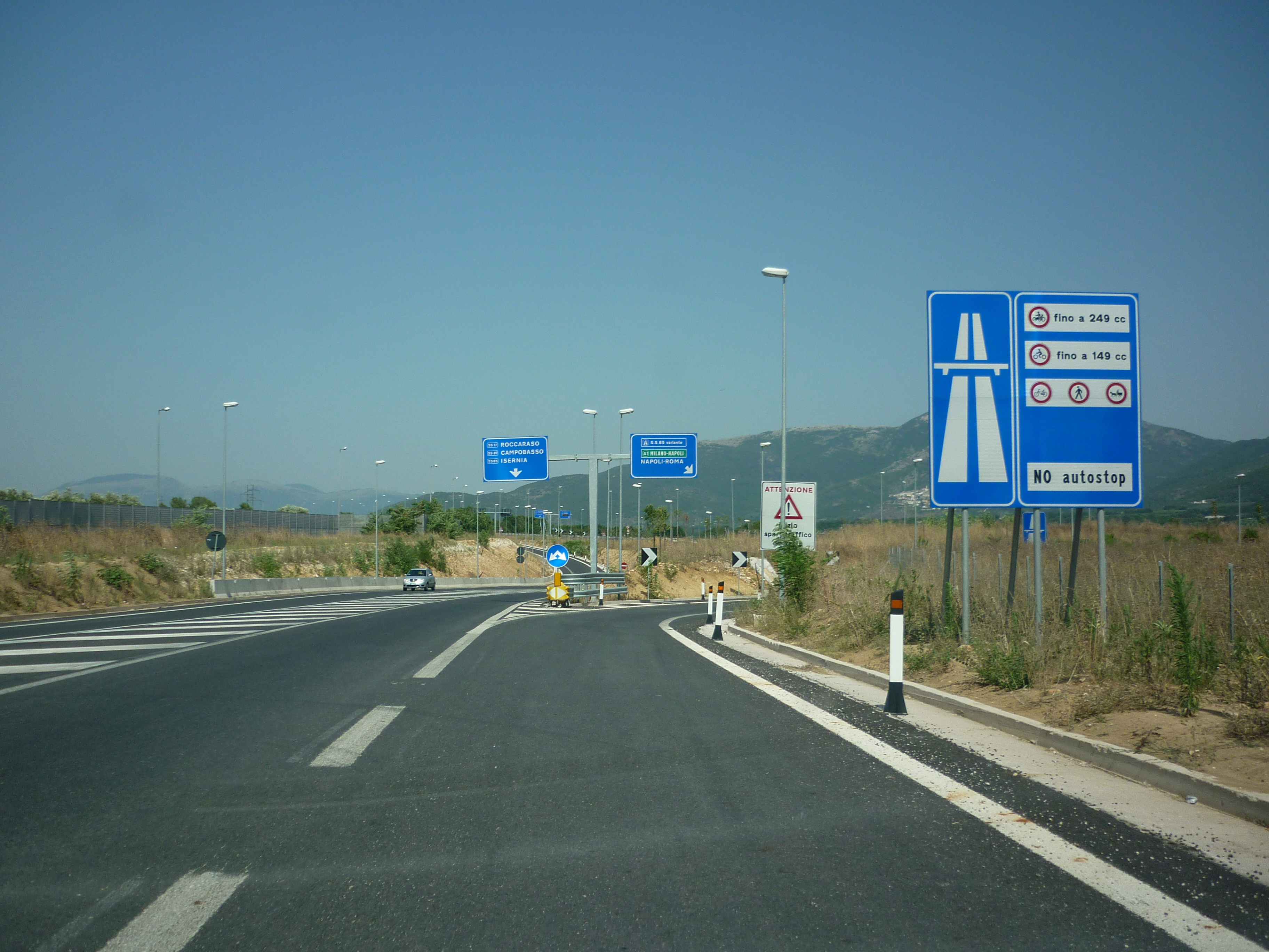 ss85